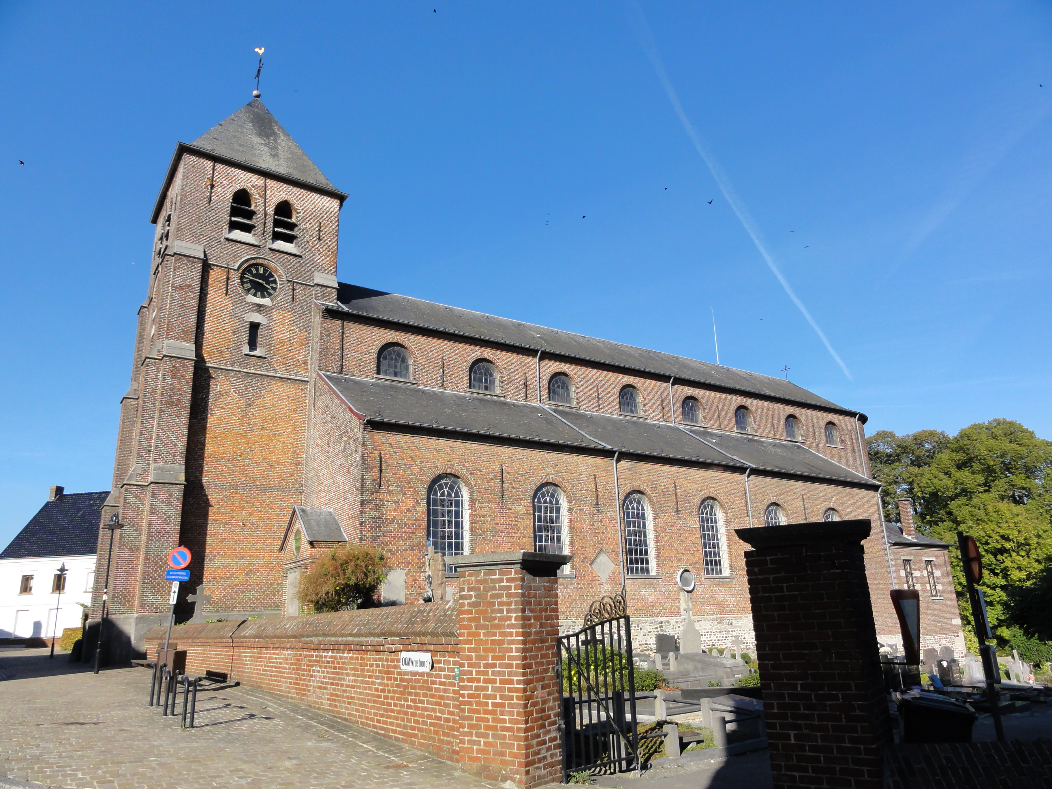 Sint-Britiuskerk in Etikhove. Sint-Britiuskerk (Church of Saint Brice) in Etikhove. Etikhove, Maarkedal, East Flanders, Belgium